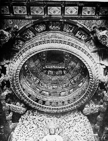 隆福寺星象图藻井